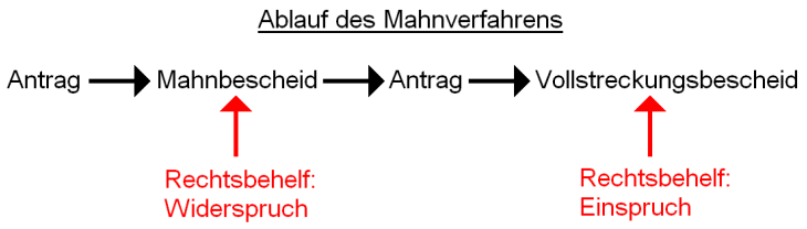 Vereinfachte Darstellung des gerichtlichen Mahnverfahrens in Deutschland.